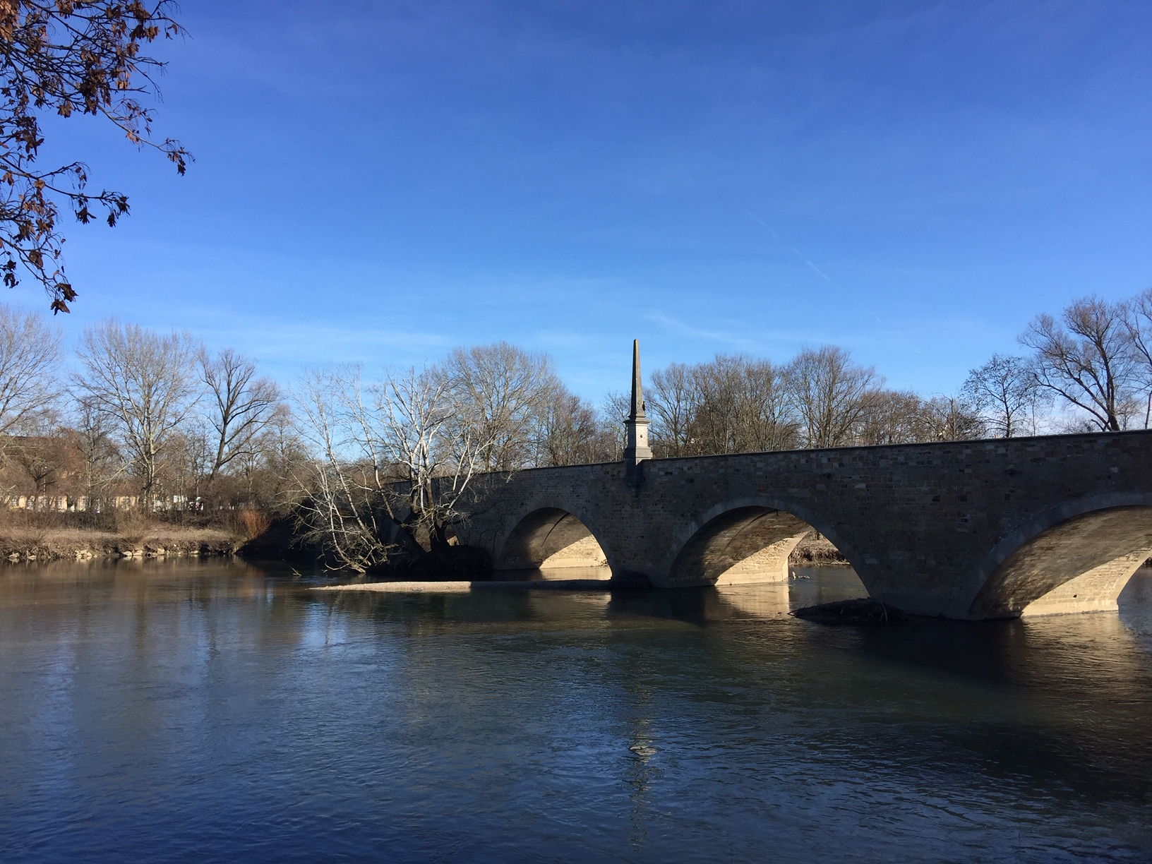 Die Ulrichsbrücke über den Neckar, erbaut zwischen 1600-1602, verbindet Wendlingen und Köngen.